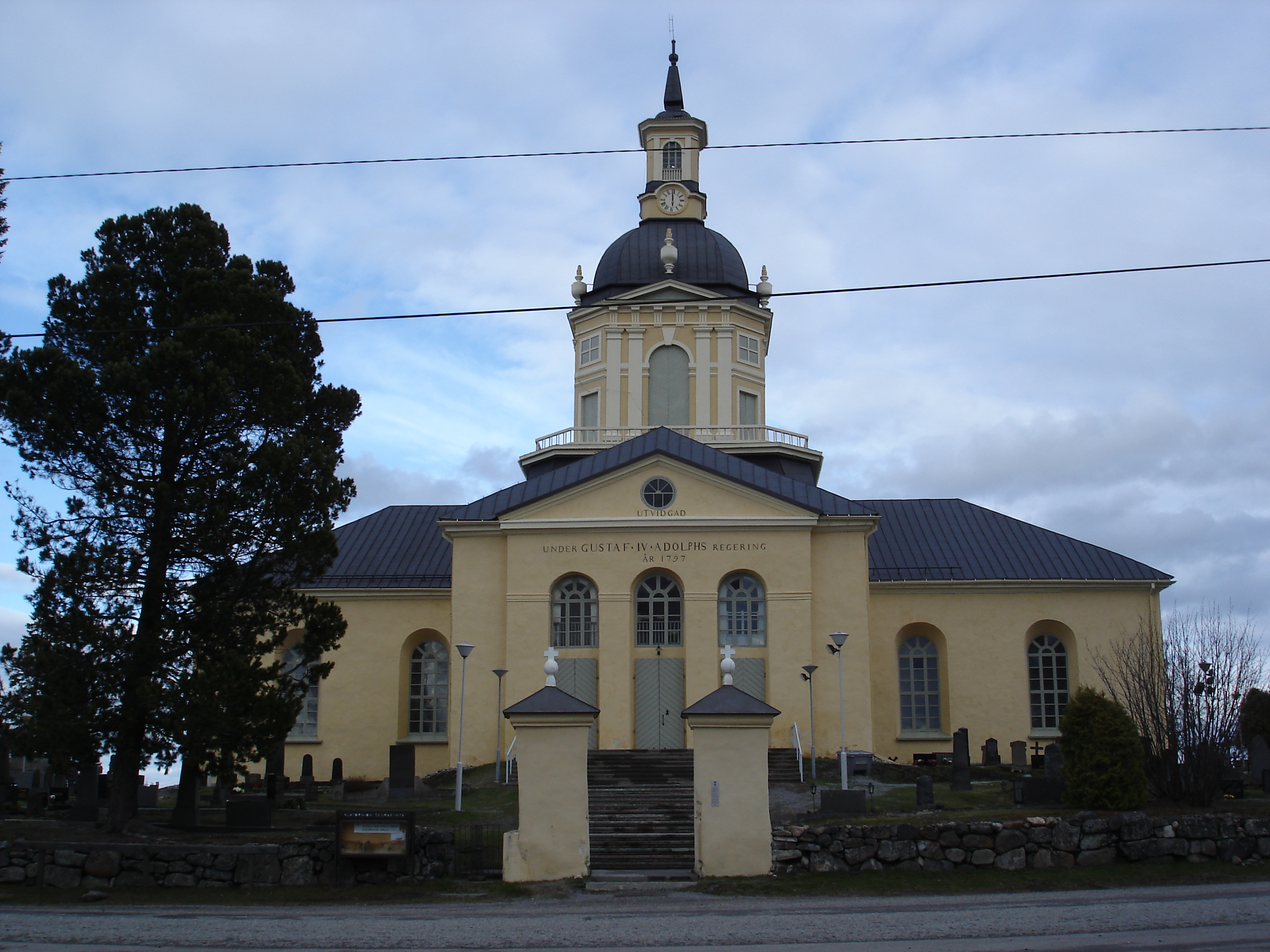 Alatornion kirkko